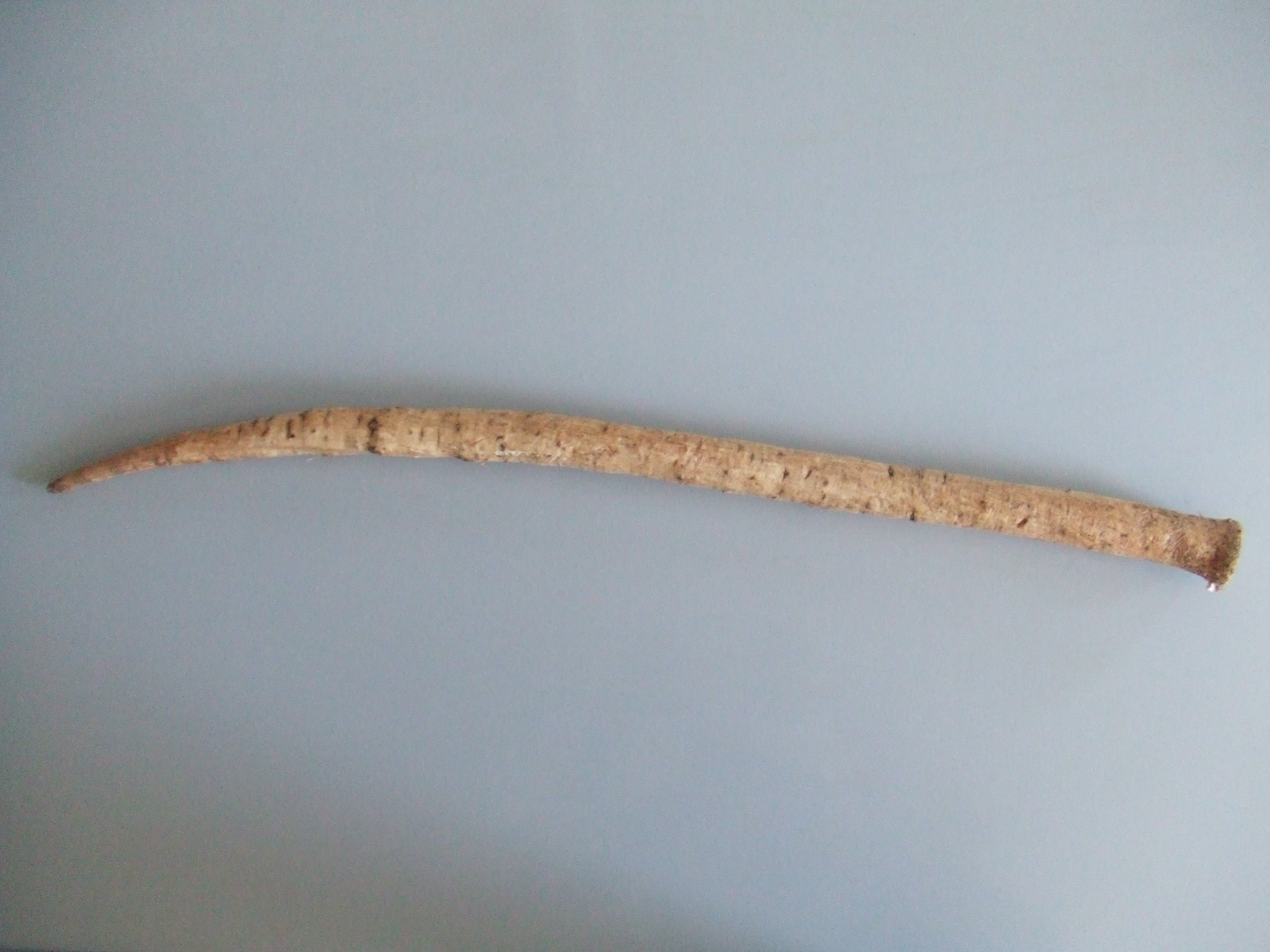 KLiswortel (burdock) gekocht in Chinese supermarkt op de West-kruiskade in Rotterdam